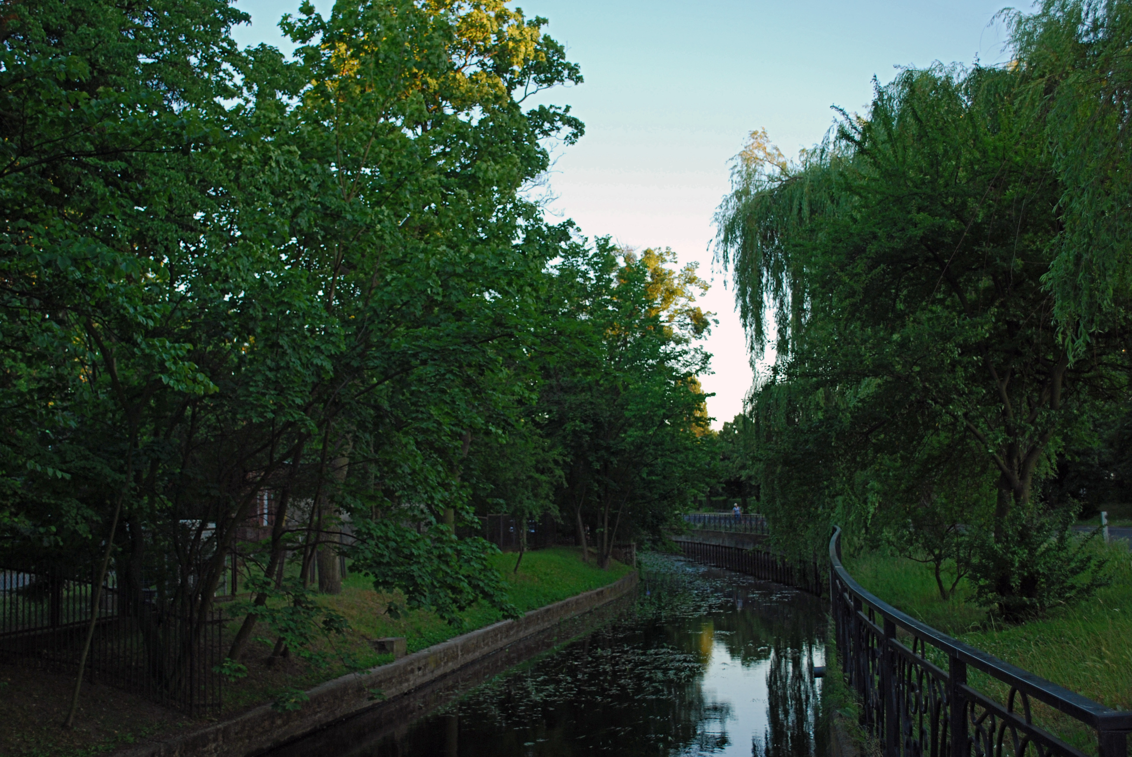 Kanał Raduni w Pruszczu Gdańskim